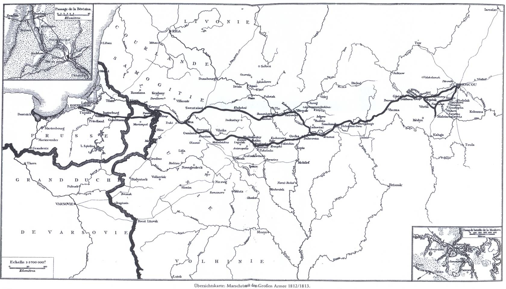 Alte französische Karte der Marschroute der großen Armee 1812/1813